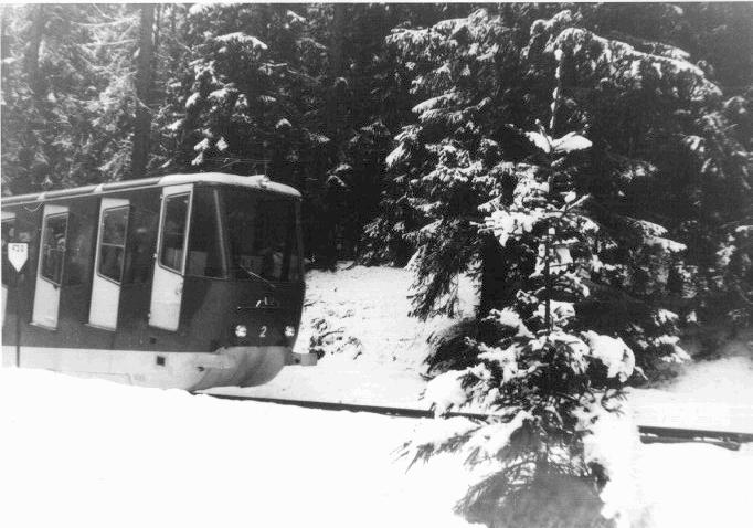 Lanovka Starý Smokovec - Hrebienok